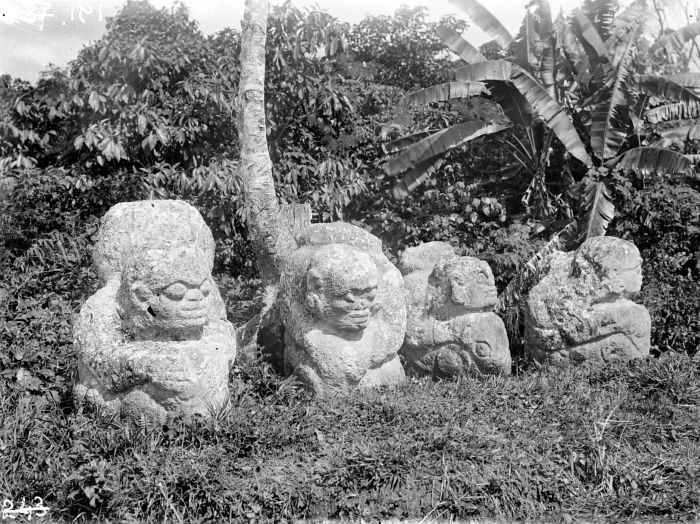 Negatif. Arca-arca figur megalit di Tegurwangi, Kota Pagaralam